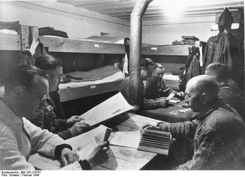 Atlantikwall Unter dickem Beton sind in den Bunkern die Mannschaftsräume wohnlich eingerichtet. Während ihrer Freizeit schreiben oder lesen die Soldaten oder vergnügen sich beim Kartenspiel. PK-Aufnahme: Kriegsberichter Schwarz 17.2.44 [Herausgabedatum]